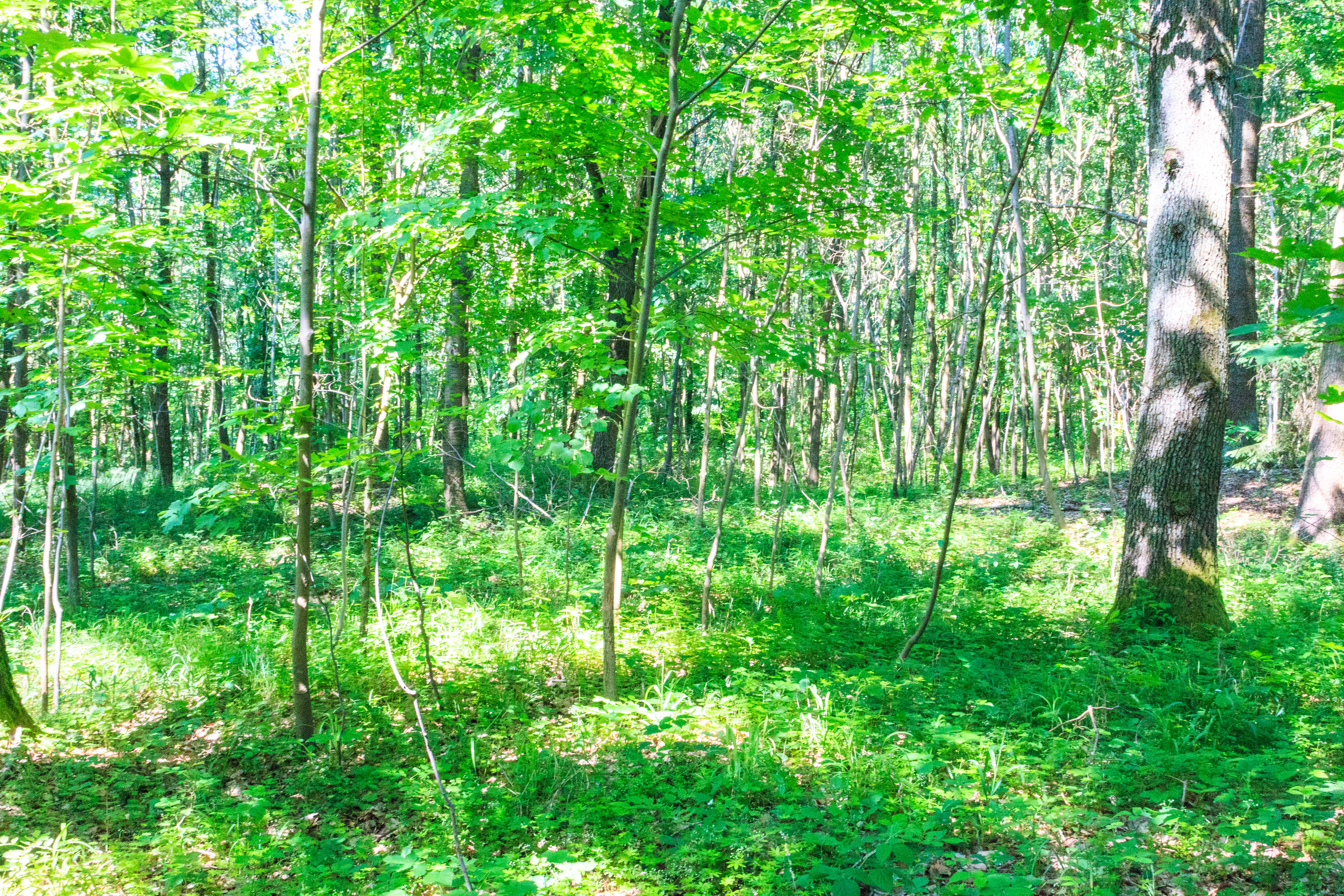 Mohylník Pod Chlumem u Semechnice